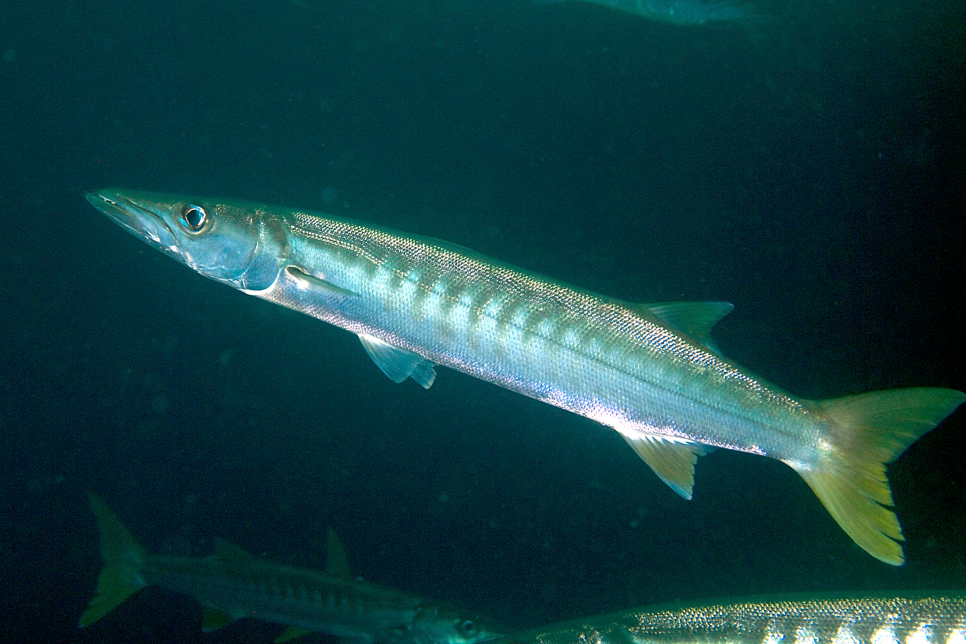 Barracuda